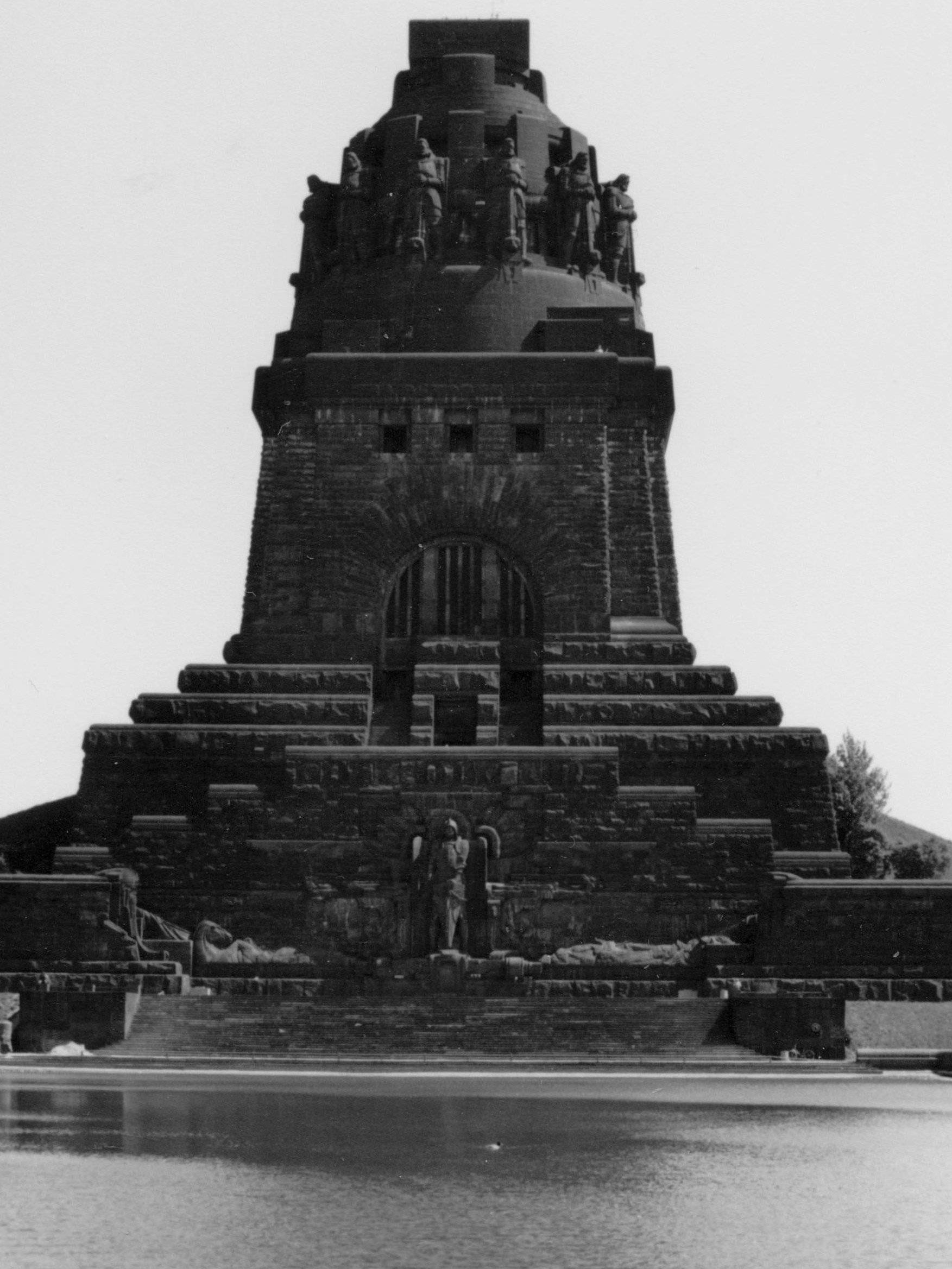 Das Völkerschlachtdenkmal in Leipzig, aufgenommen im Mai 1988.